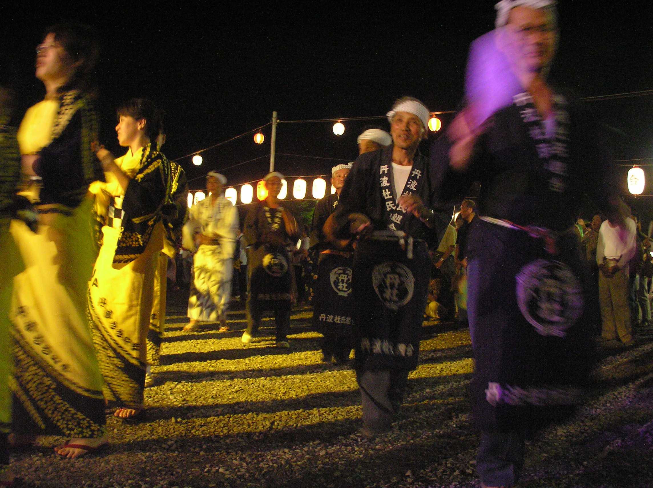 撮影：おぉたむすねィく探検隊】 撮影日 2005．8.15